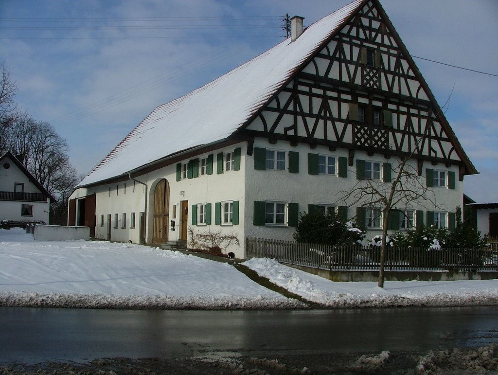 Pleß Fachwerkhof